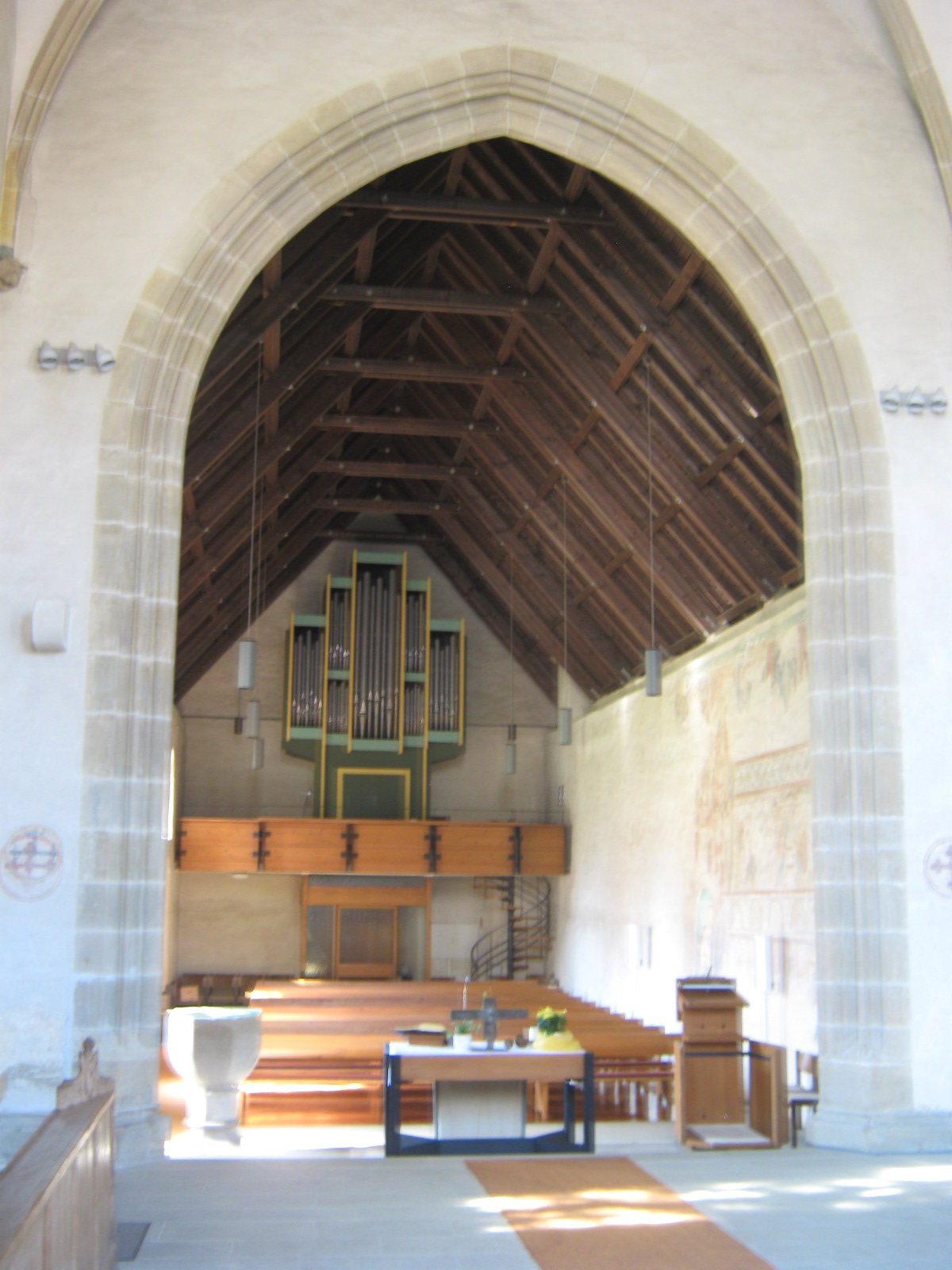 Die denkmalgeschützte evangelische Marienkirche Im Wiesaztal 10 in Bronnweiler bei Reutlingen. wurde sie in der ersten Hälfte des 12. Jahrhunderts erbaut. Kirchenschiff mit Weigle-Orgel von 1973.